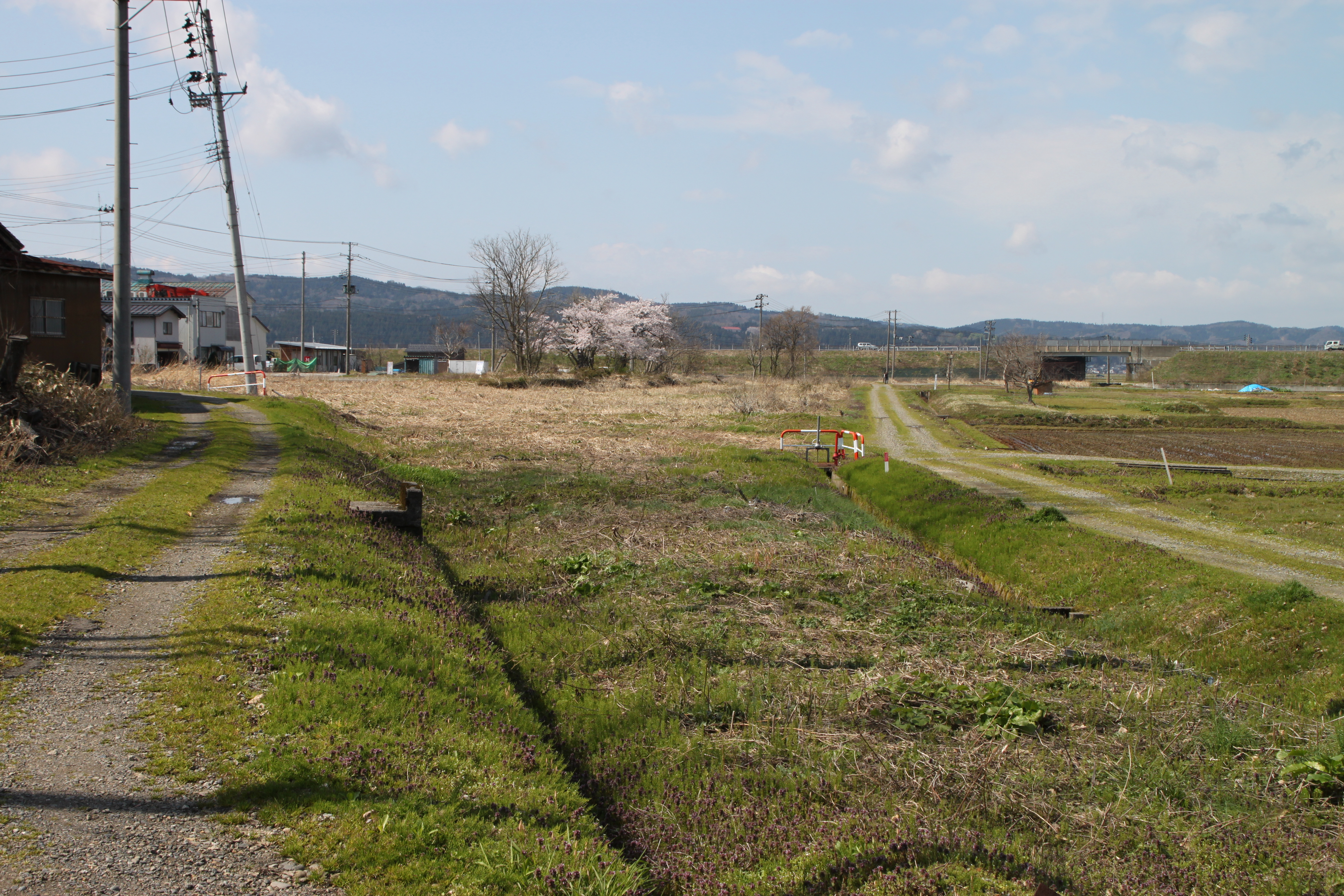 長岡鉄道越後関原駅跡。西長岡側から駅跡を見る。左の奥に駅舎があった。